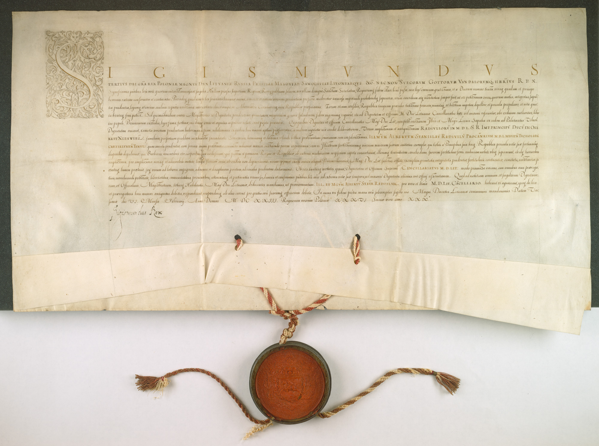 Akt nadania przez Zygmunta III Wazę, króla polskiego, urzędu kanclerza litewskiego Albertowi Stanisławowi Radziwiłłowi, podkanclerzemu litewskiemu, wystawiony 6 lutego 1623 roku w Warszawie. Dokument pergaminowy o wymiarach 66 x 34,5 z pieczęcią Wielkiego Księstwa Litewskiego.